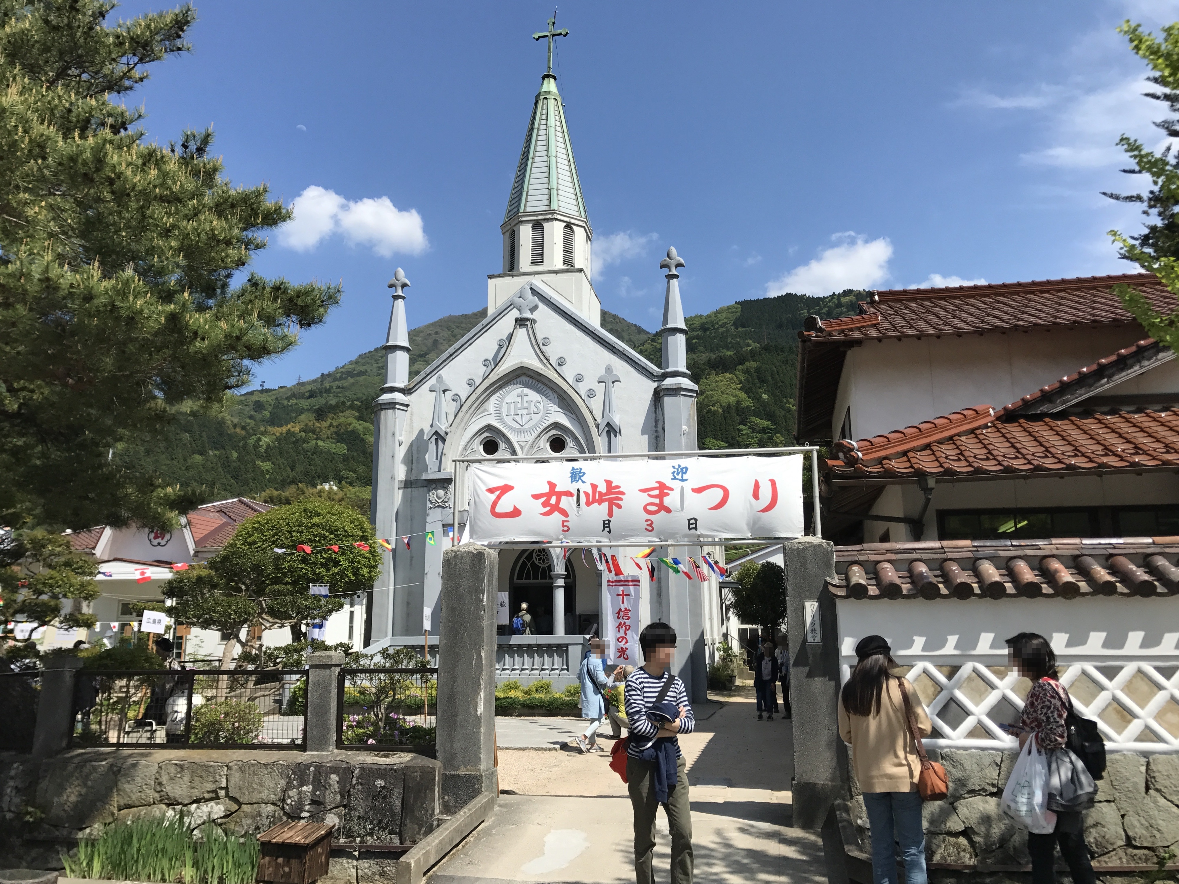 カトリック津和野教会